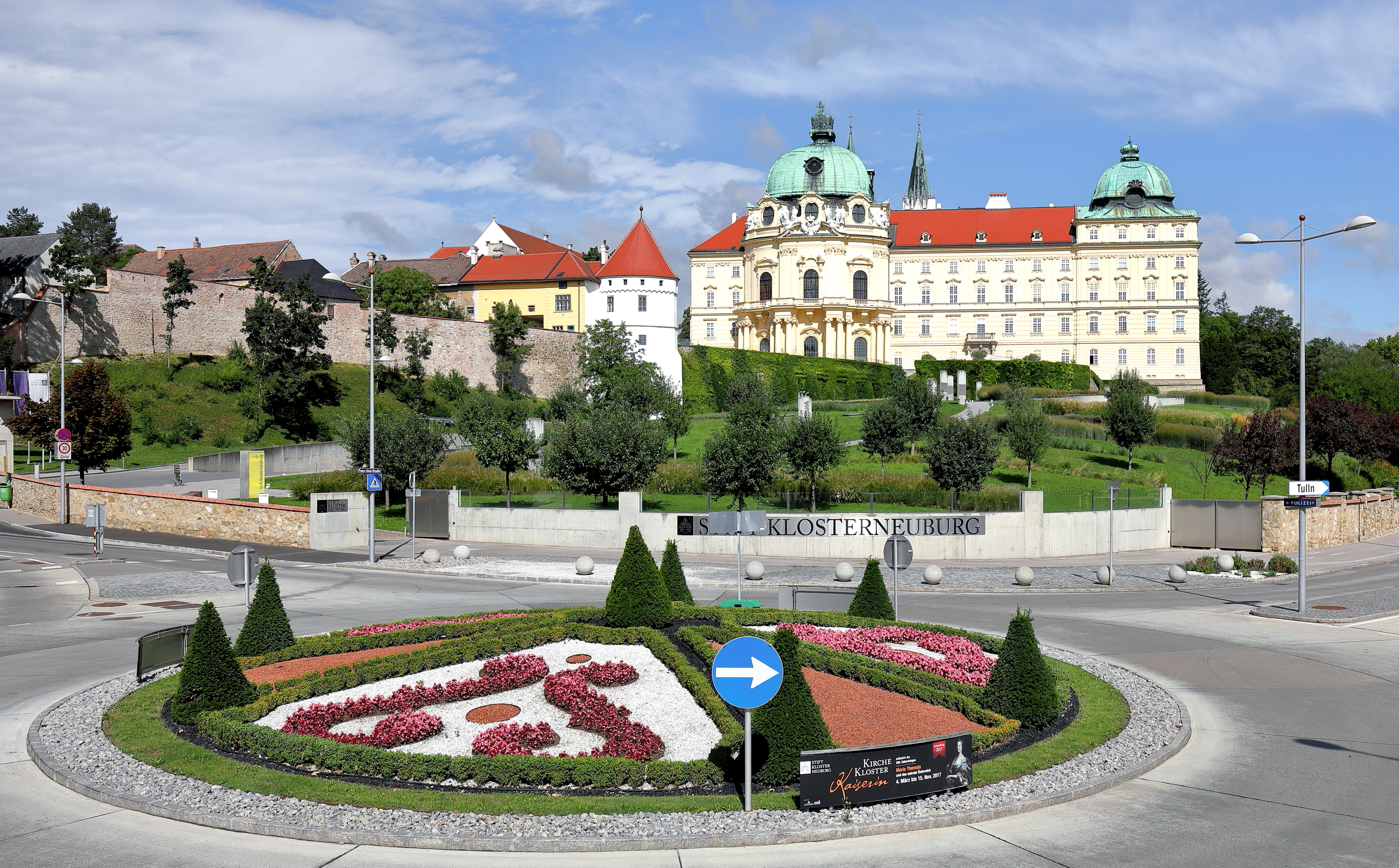 Blick von der Wiener Straße Richtung Augustiner-Chorherrenstift (Südostansicht des Kaisertraktes) in der niederösterreichischen Stadt Klosterneuburg und links ein Teil der ehemaligen Stadtbefestigung mit dem "Sattlerturm".